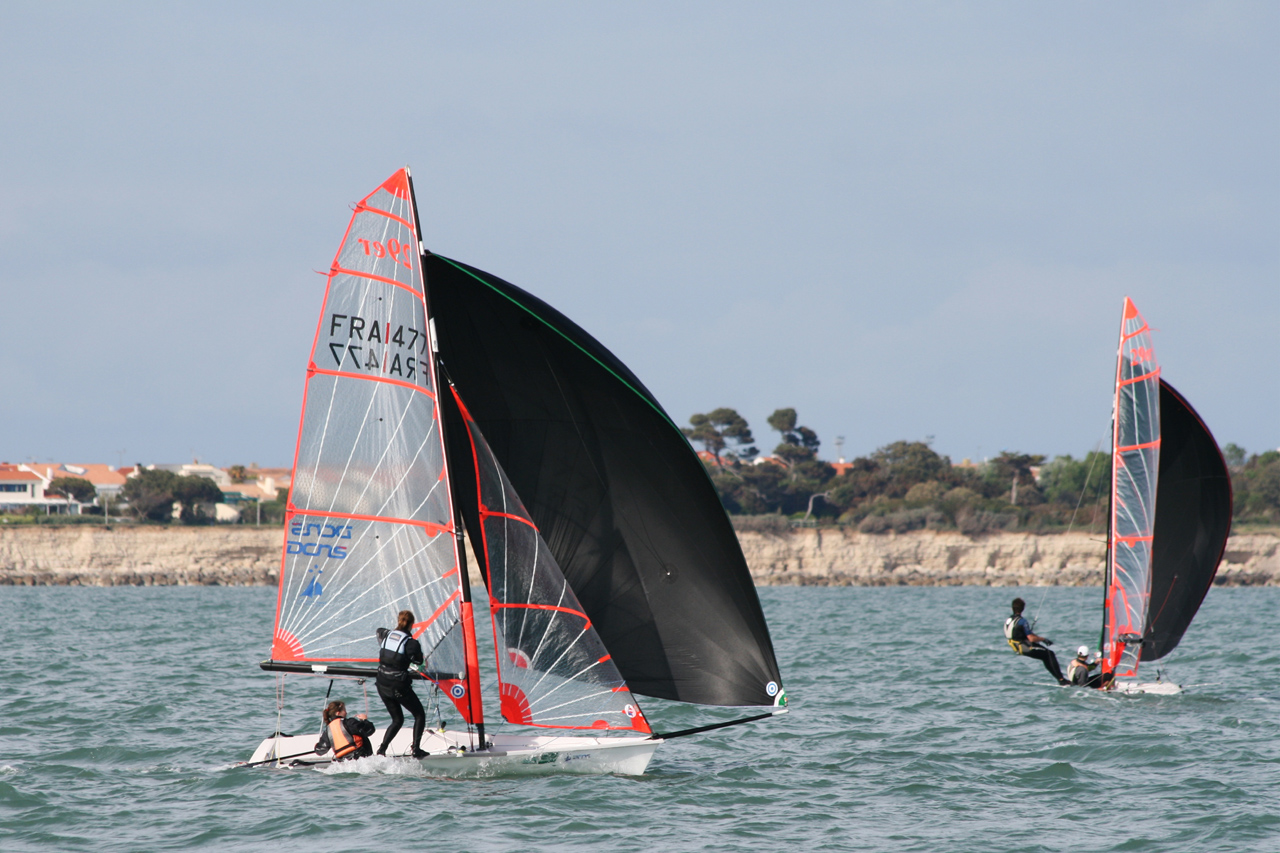 Deriveurs 29er dans la baie de La Rochelle